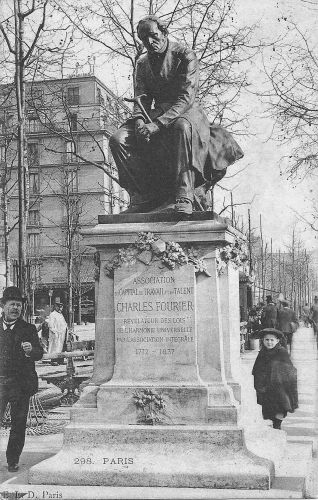 statue de Charles Fourier érigé place de Clichy à paris en juin 1899